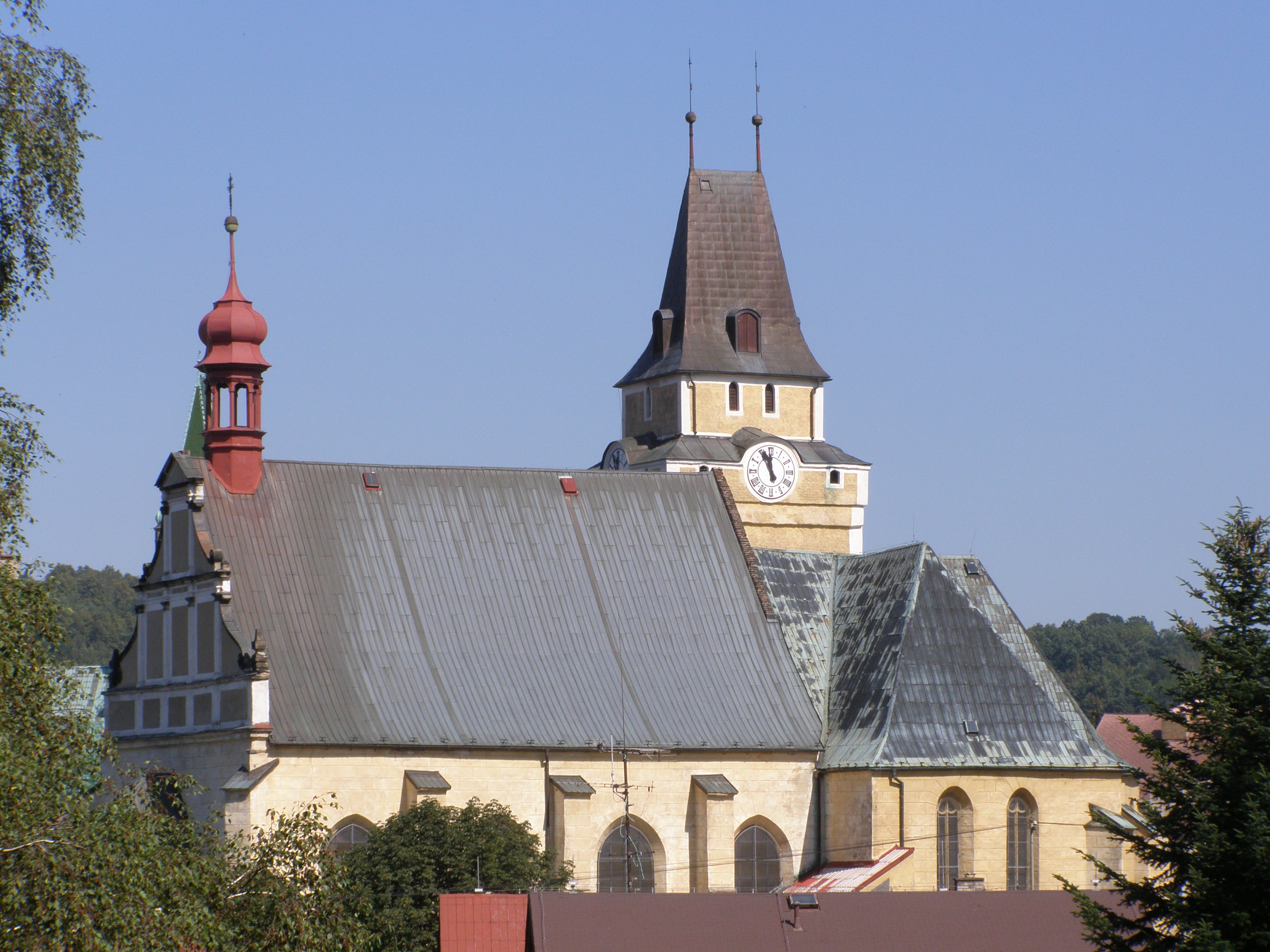 Česky: Frýdlant, kostel Nalezení svatého Kříže